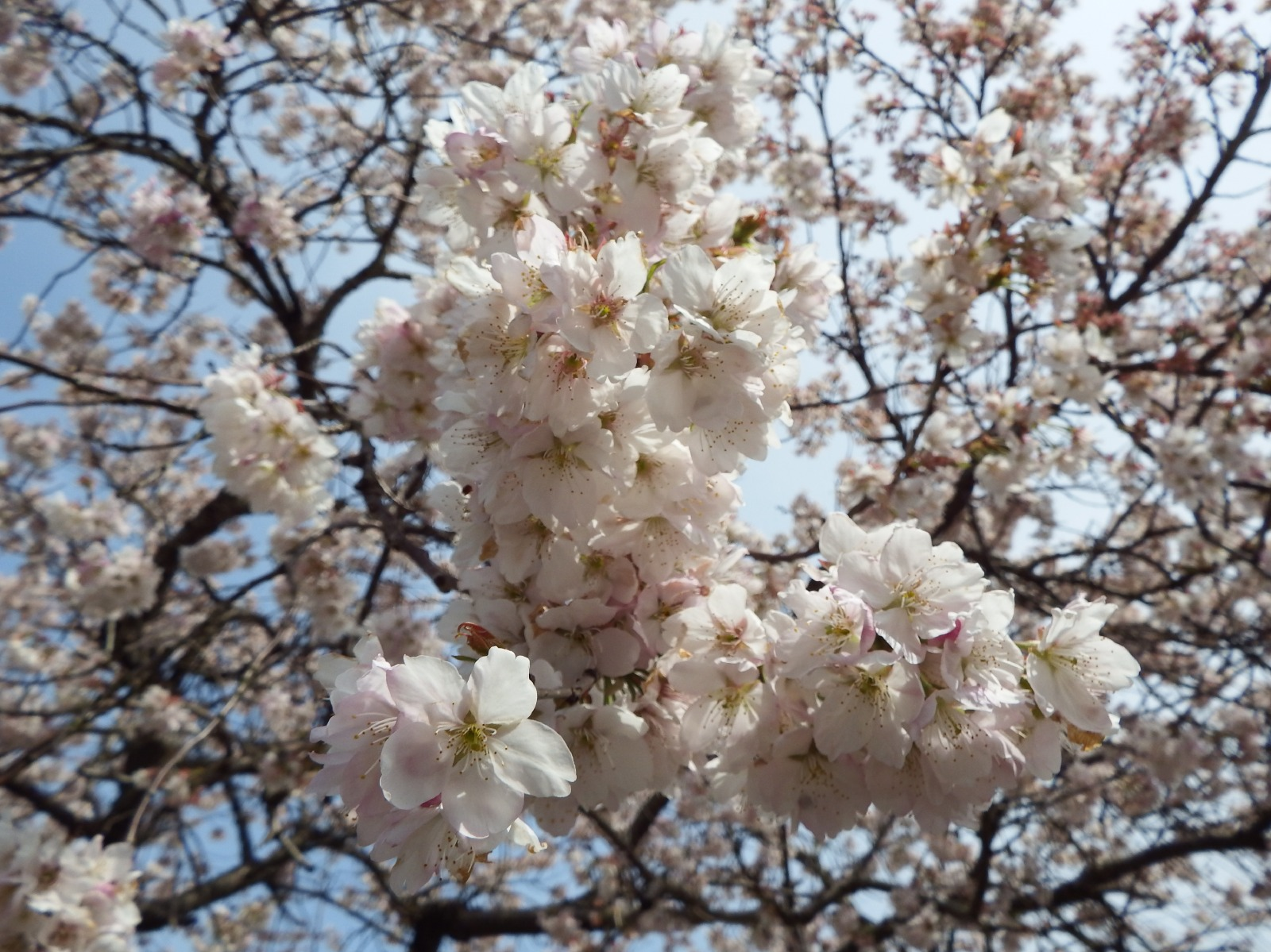 明正寺桜の枝